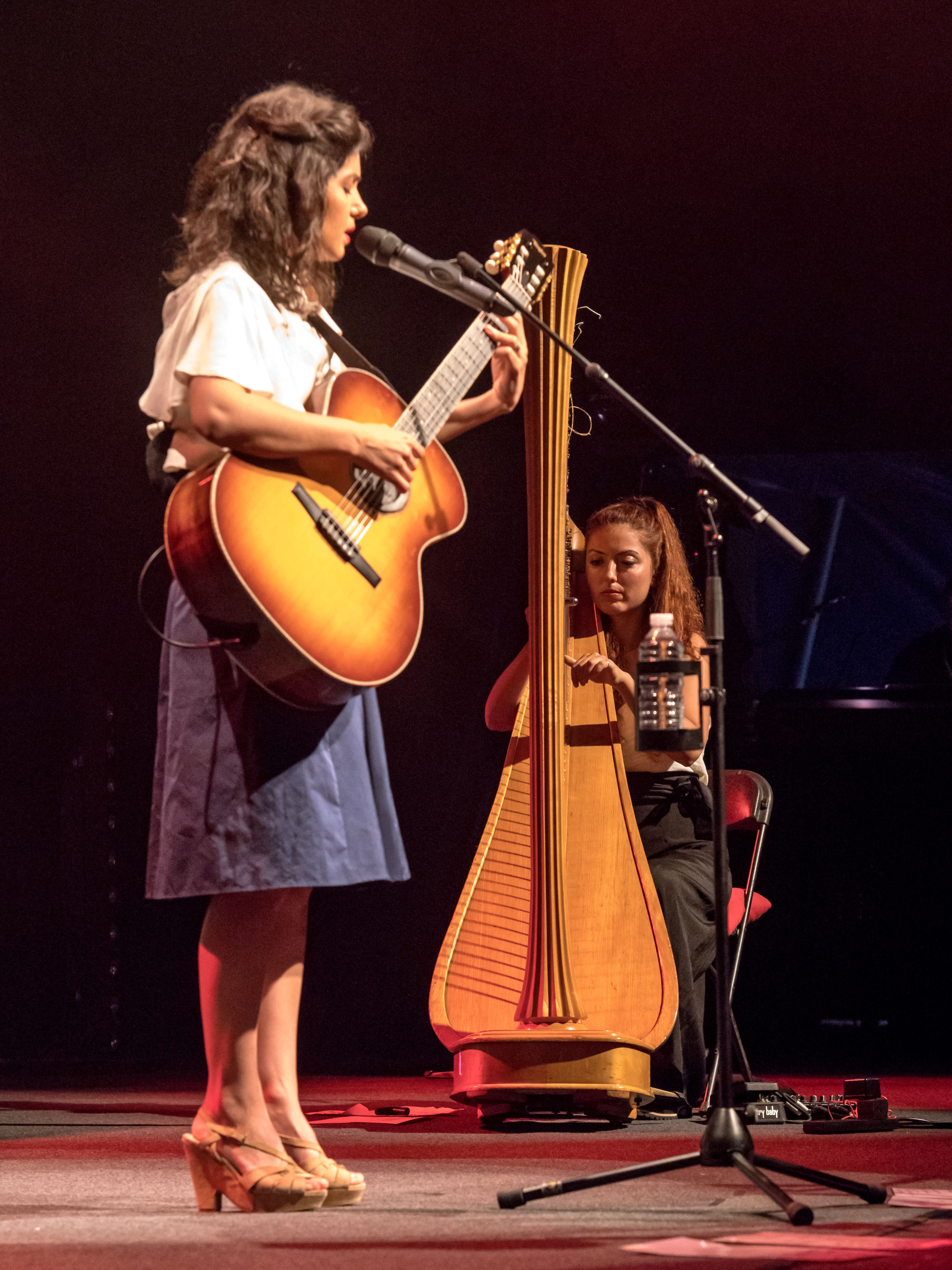 Bilder vom Zelt Musik Festival 2016 in Freiburg im Breisgau Katie Melua